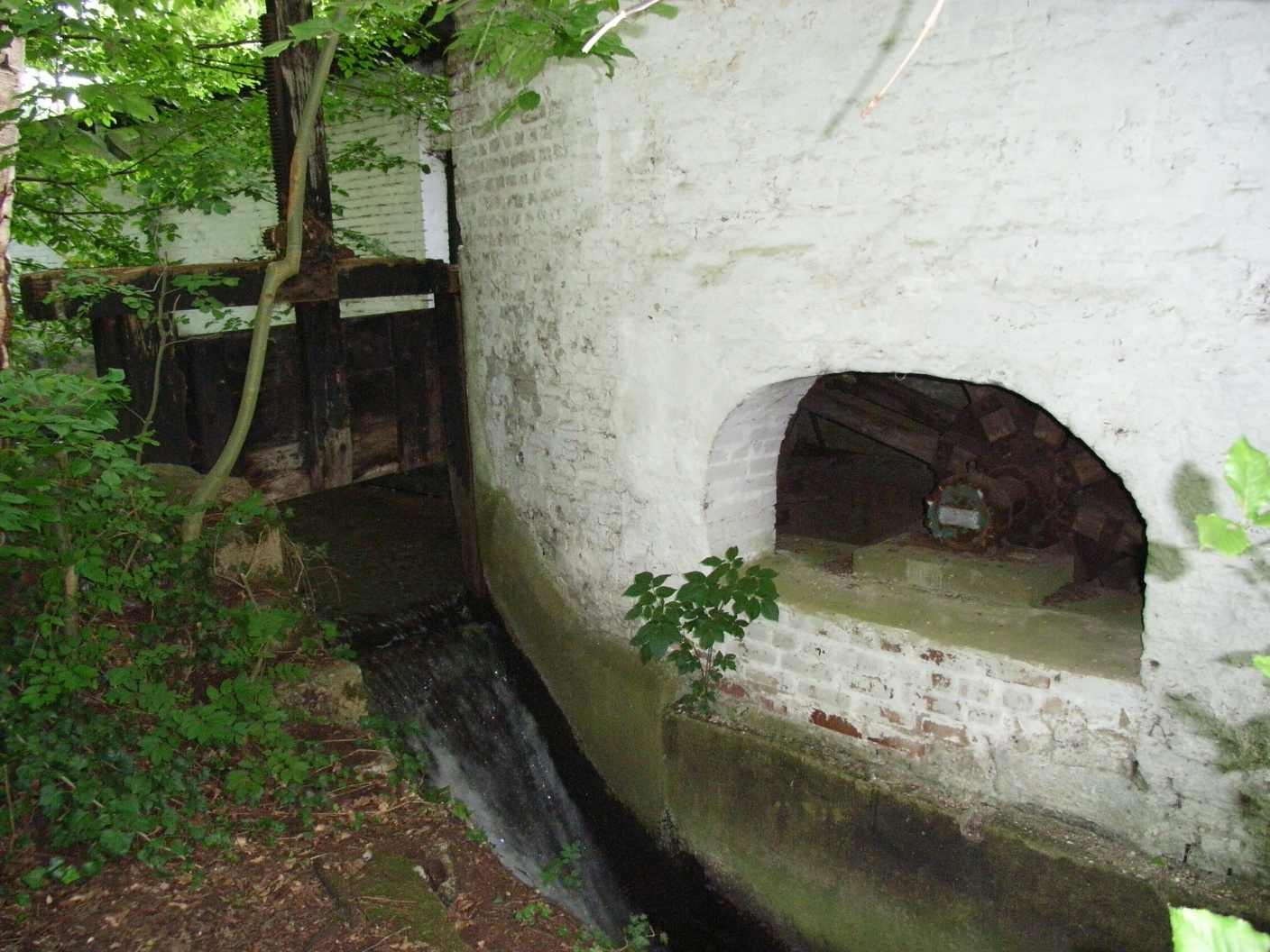 Kellenerger Mühle, Jülich-Barmen